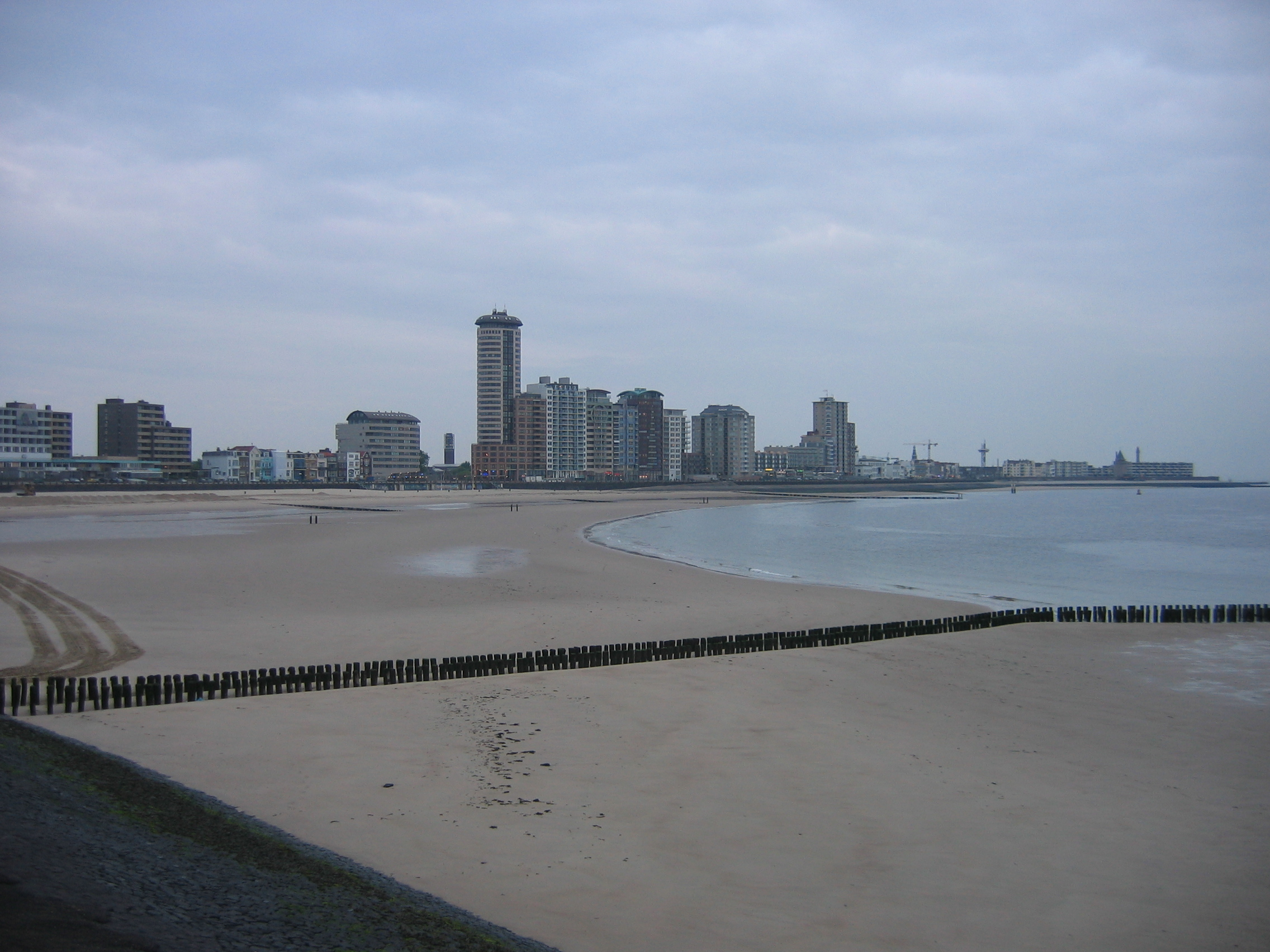 De Boulevard van Vlissingen. In het midden de Sardijntoren.